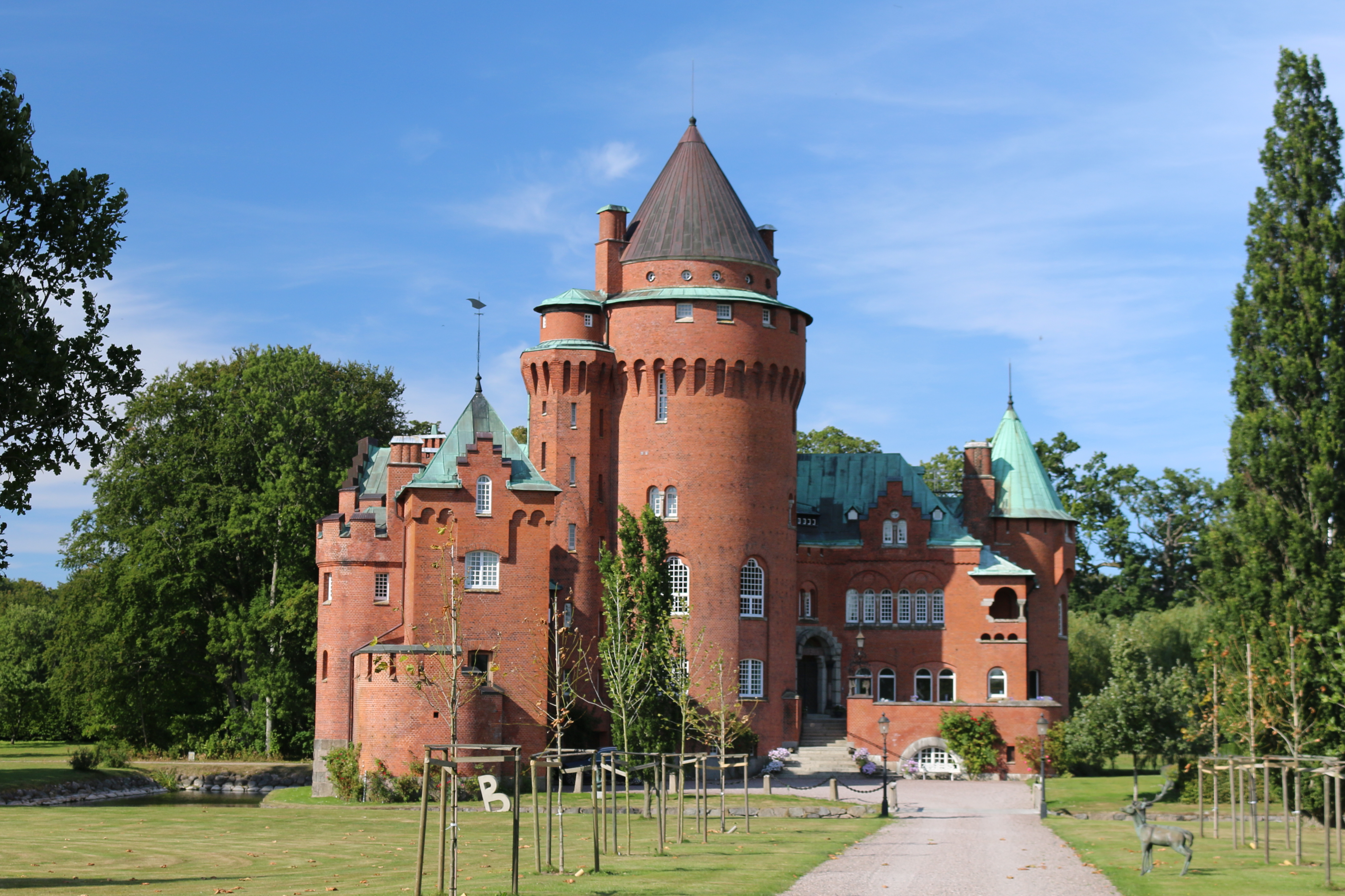 Hjularöds slott augusti 2015